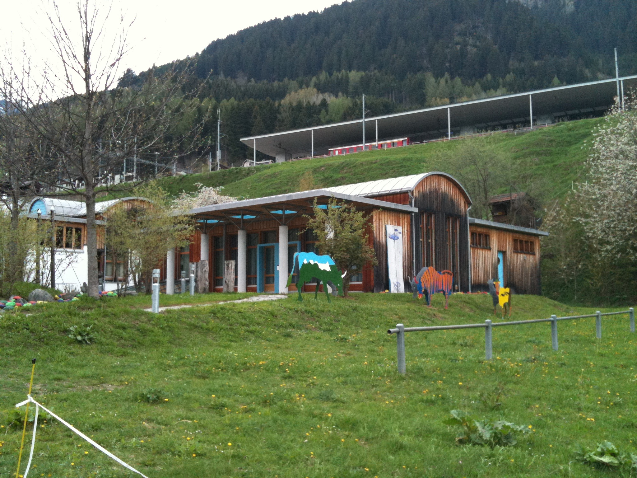 reformiertes Kirchgemeindezentrum Aua Viva in Disentis, Kanton Graubünden